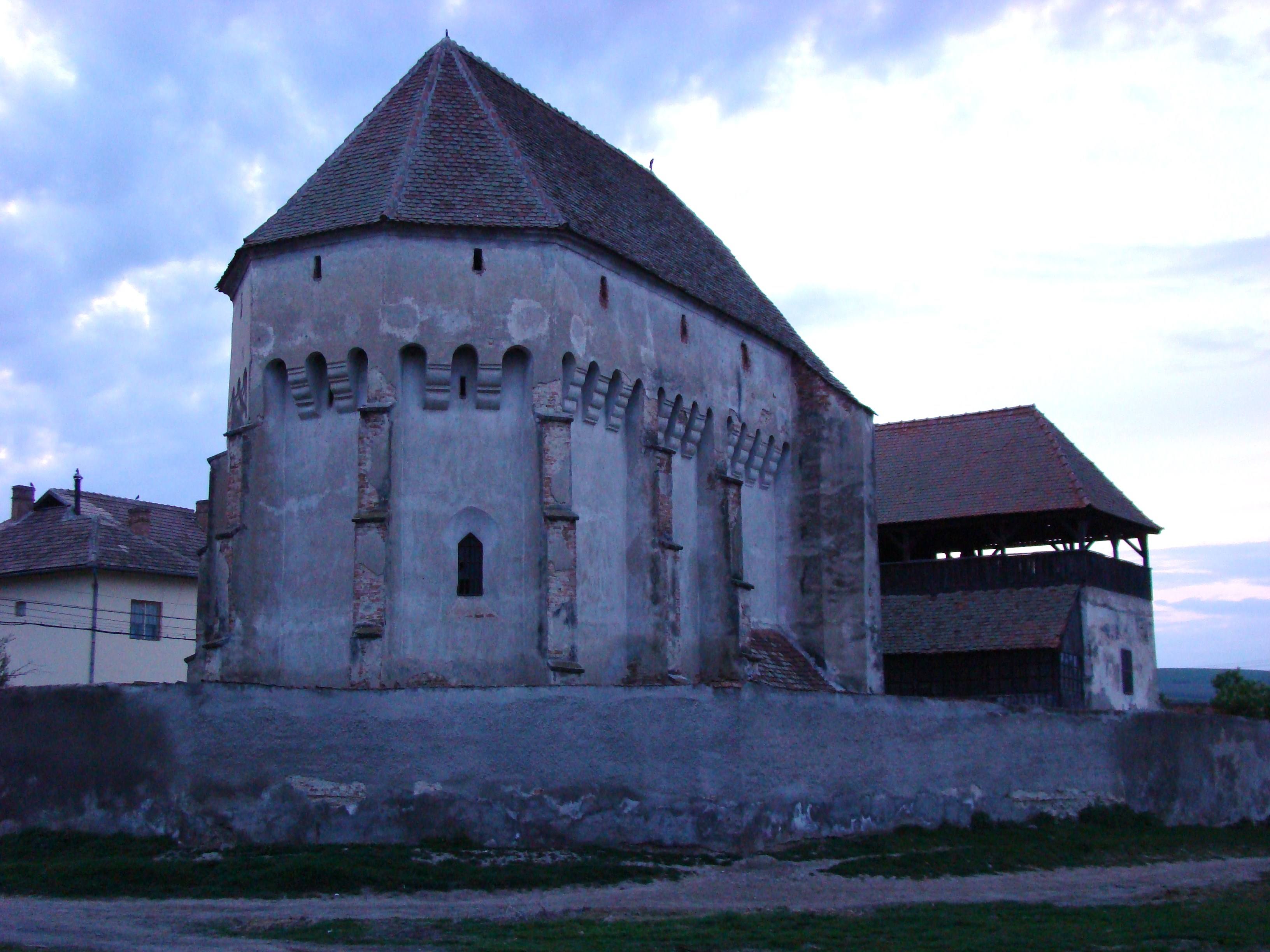 Wehrkirche in Boz (Bußd), Alba, Siebenbürgen, Rumänien